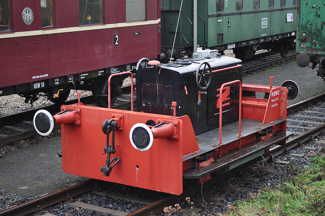 Rangiergerät HSW 2